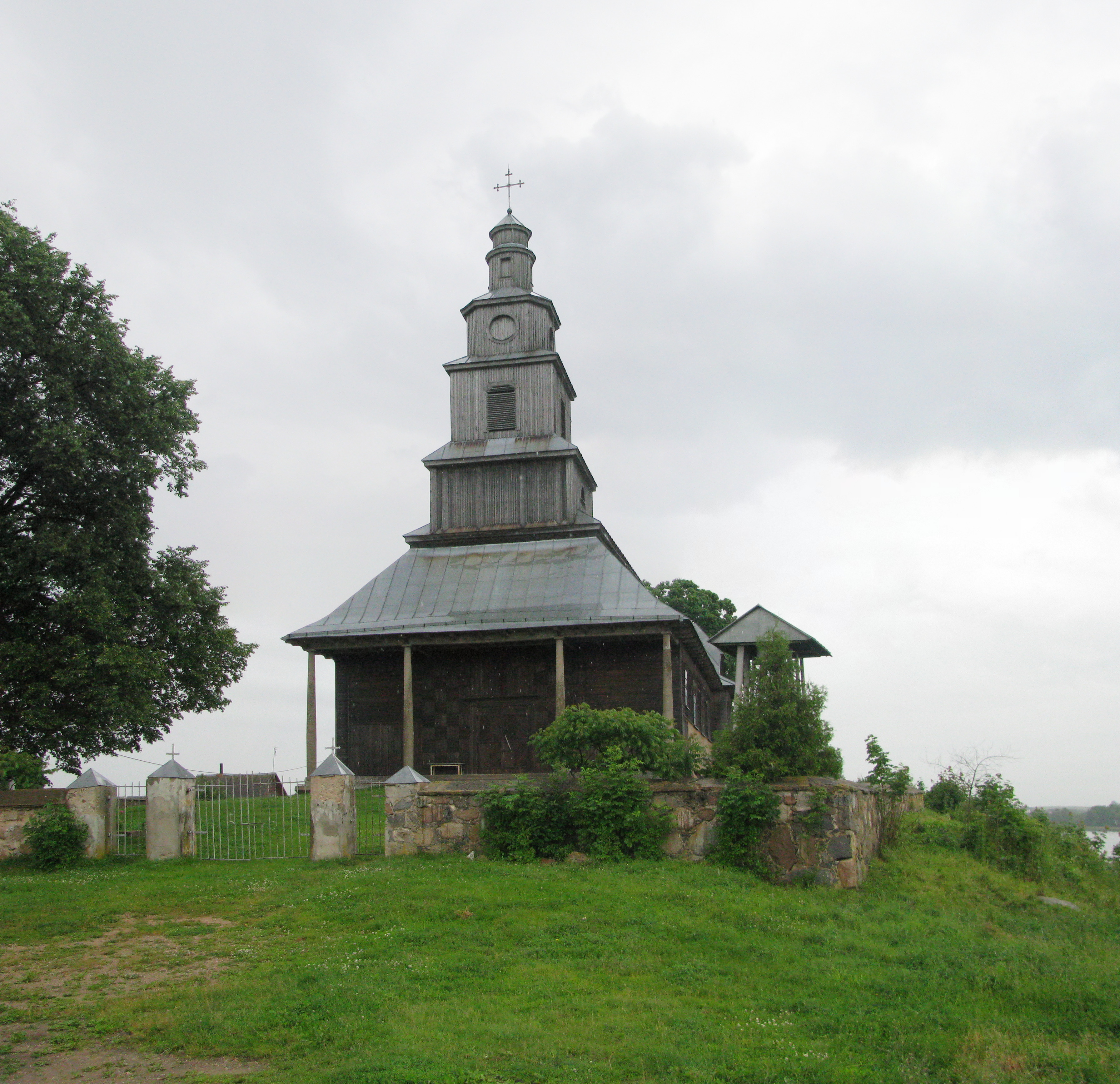 Беларуская (тарашкевіца): Петрапаўлаўскі касьцёл. в. Дрысьвяты This is a photo of Belarusian heritage monument. Reference number: 213Г000188 ( WLM)